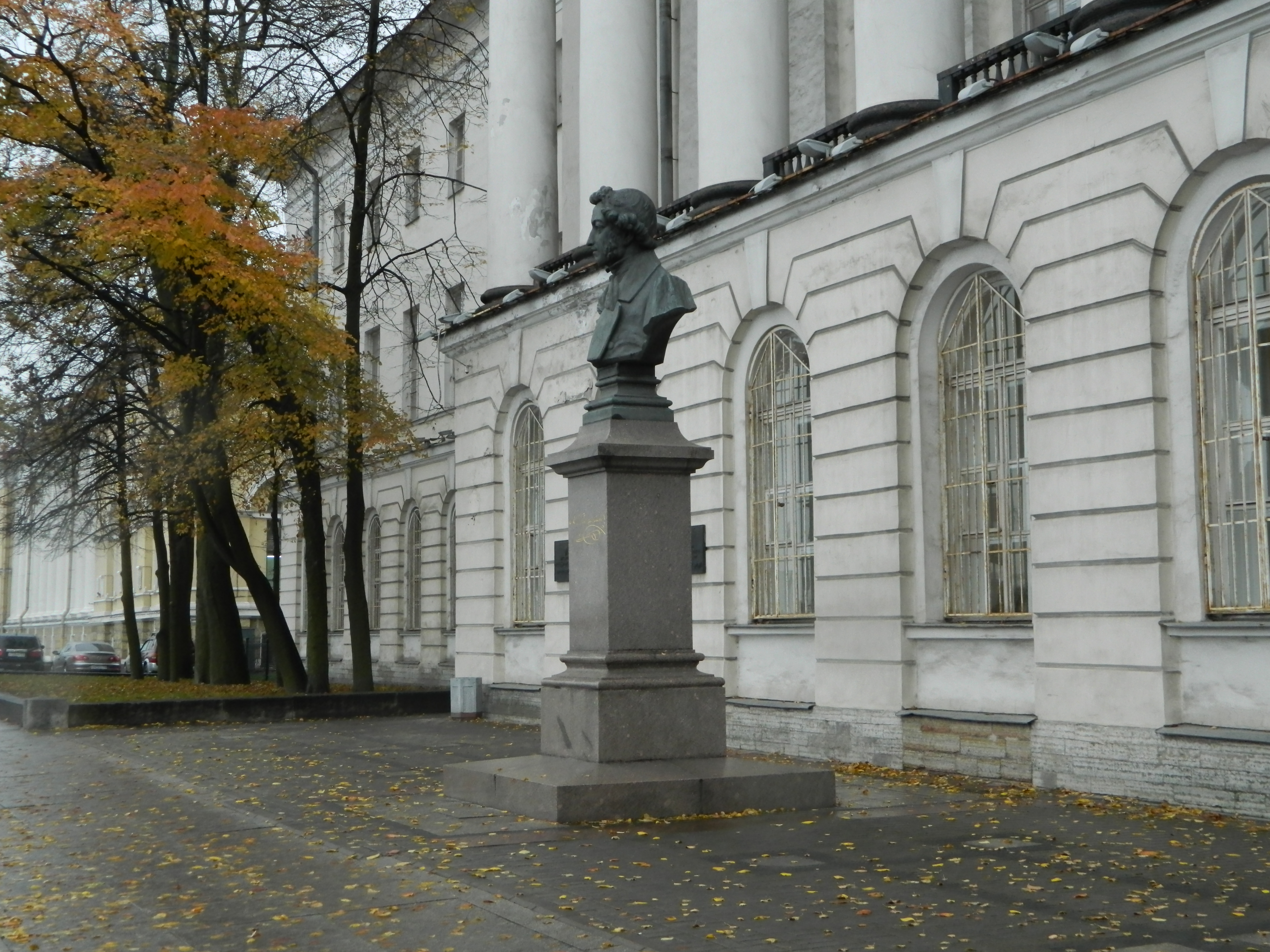 Таможня (институт Русской литературы)